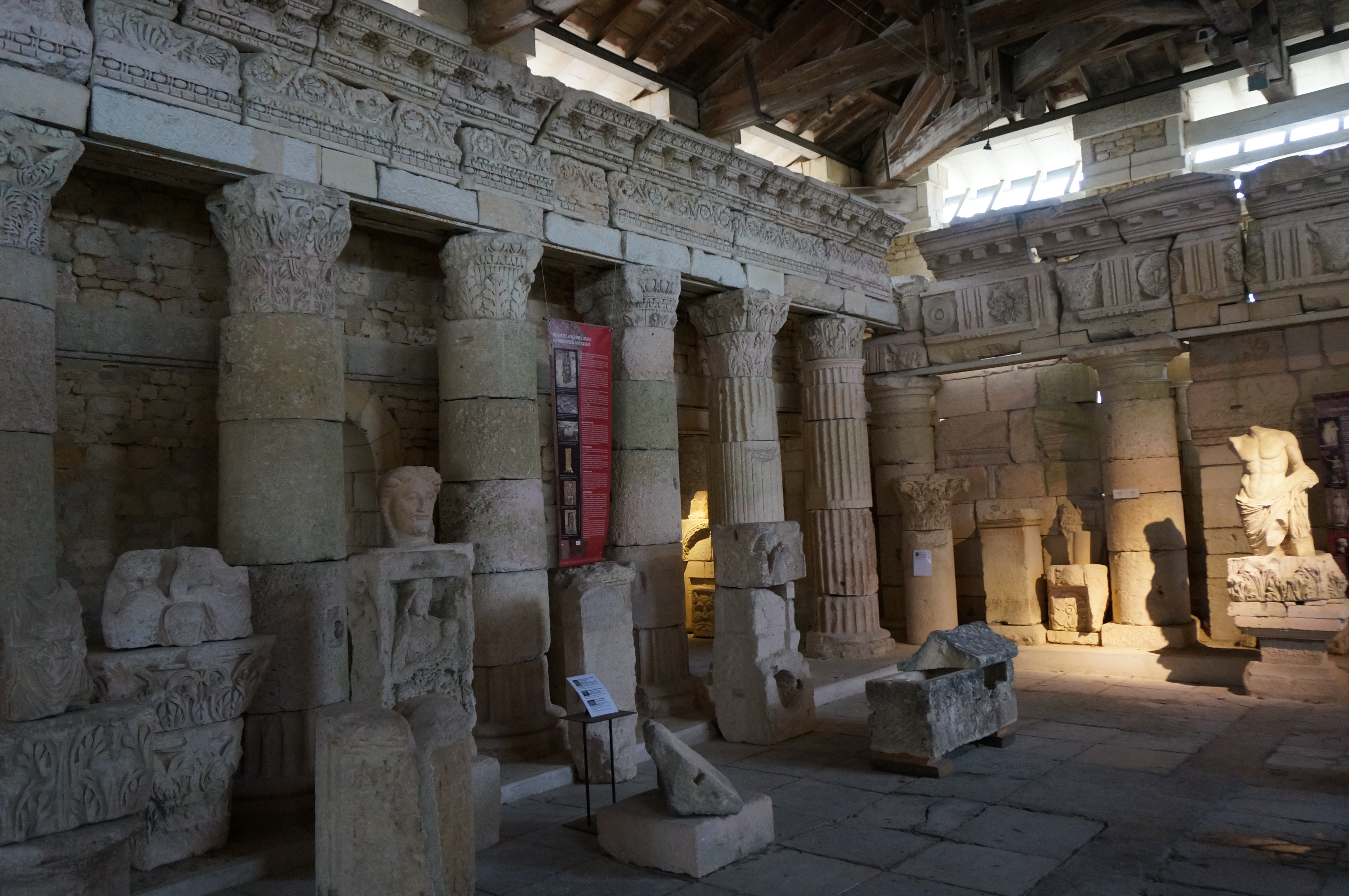 Visible au musée.